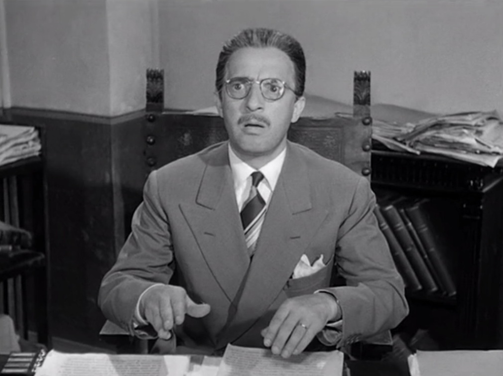 Screenshot dal film Accadde al commissariato (1954)